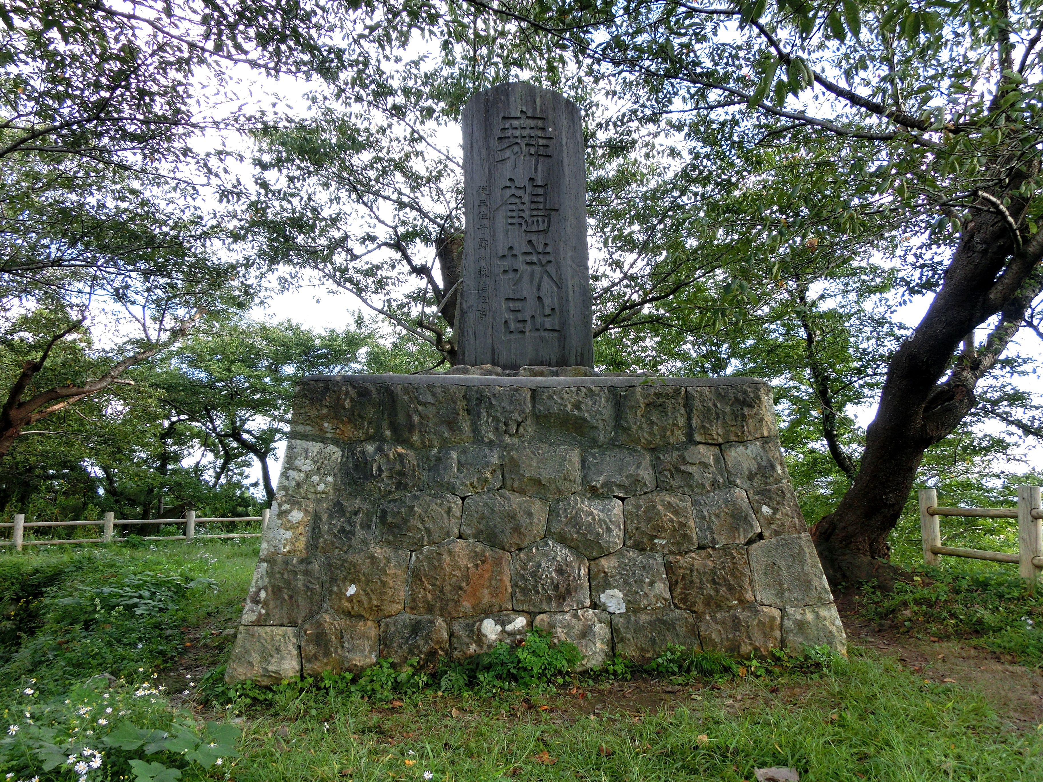 村上城（舞鶴城）跡